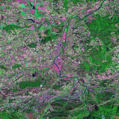 France, Aude (11), Limoux, vue de Landsat 7 avec Limoux au centre et l'Aude qui traverse la ville en venant du Sud et en partant vers le nord